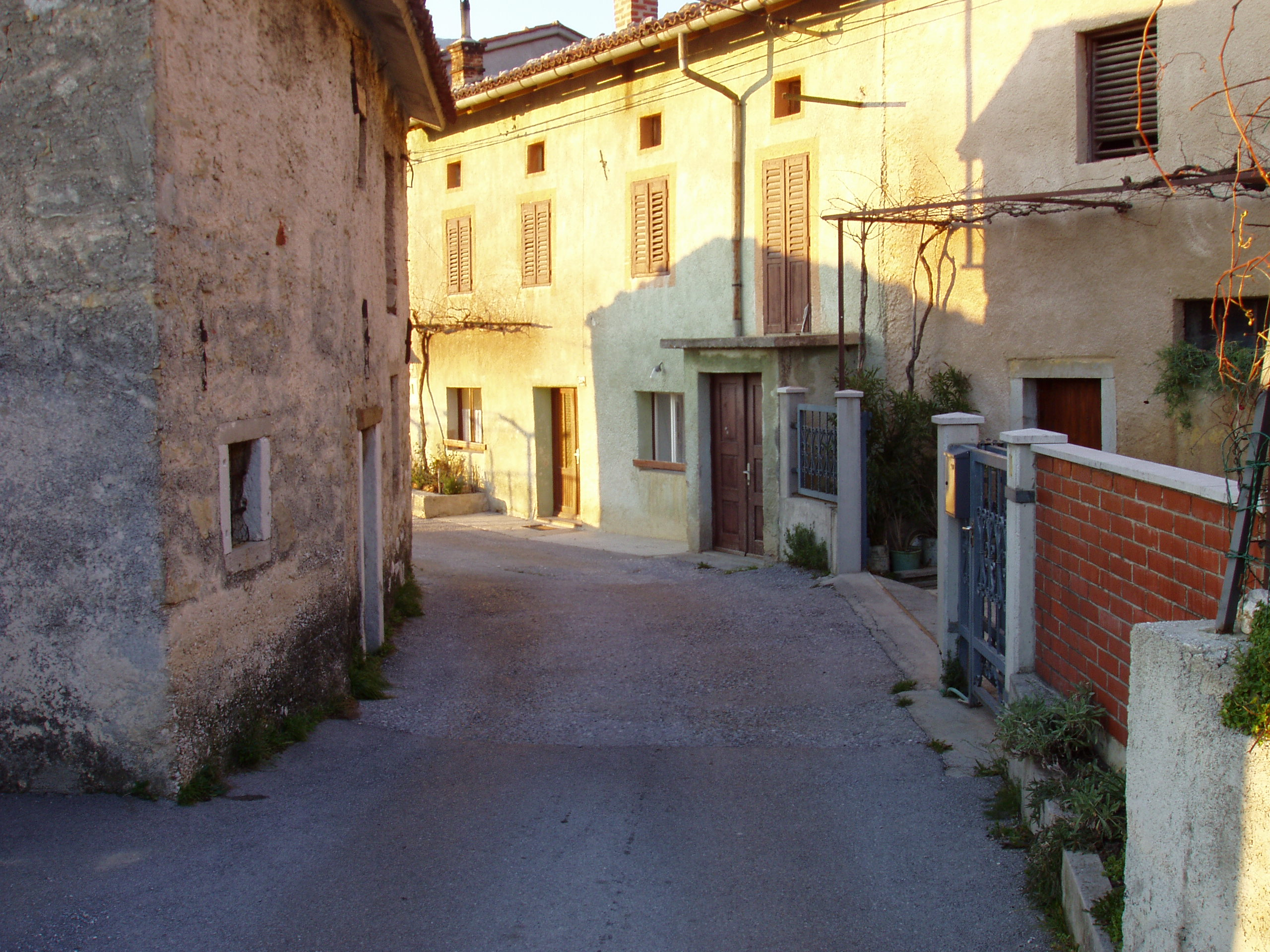 East side entrance to Gorenje near Lokavec